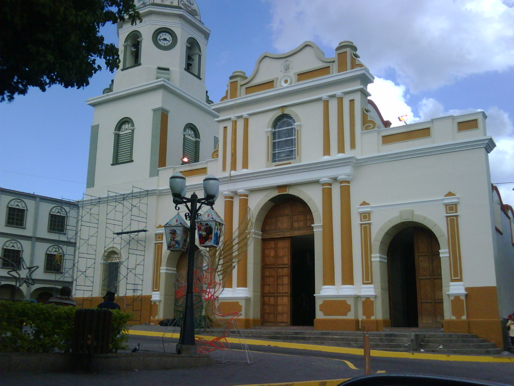 Iglesia de Santa Rosa — en Barquisimeto, Venezuela.